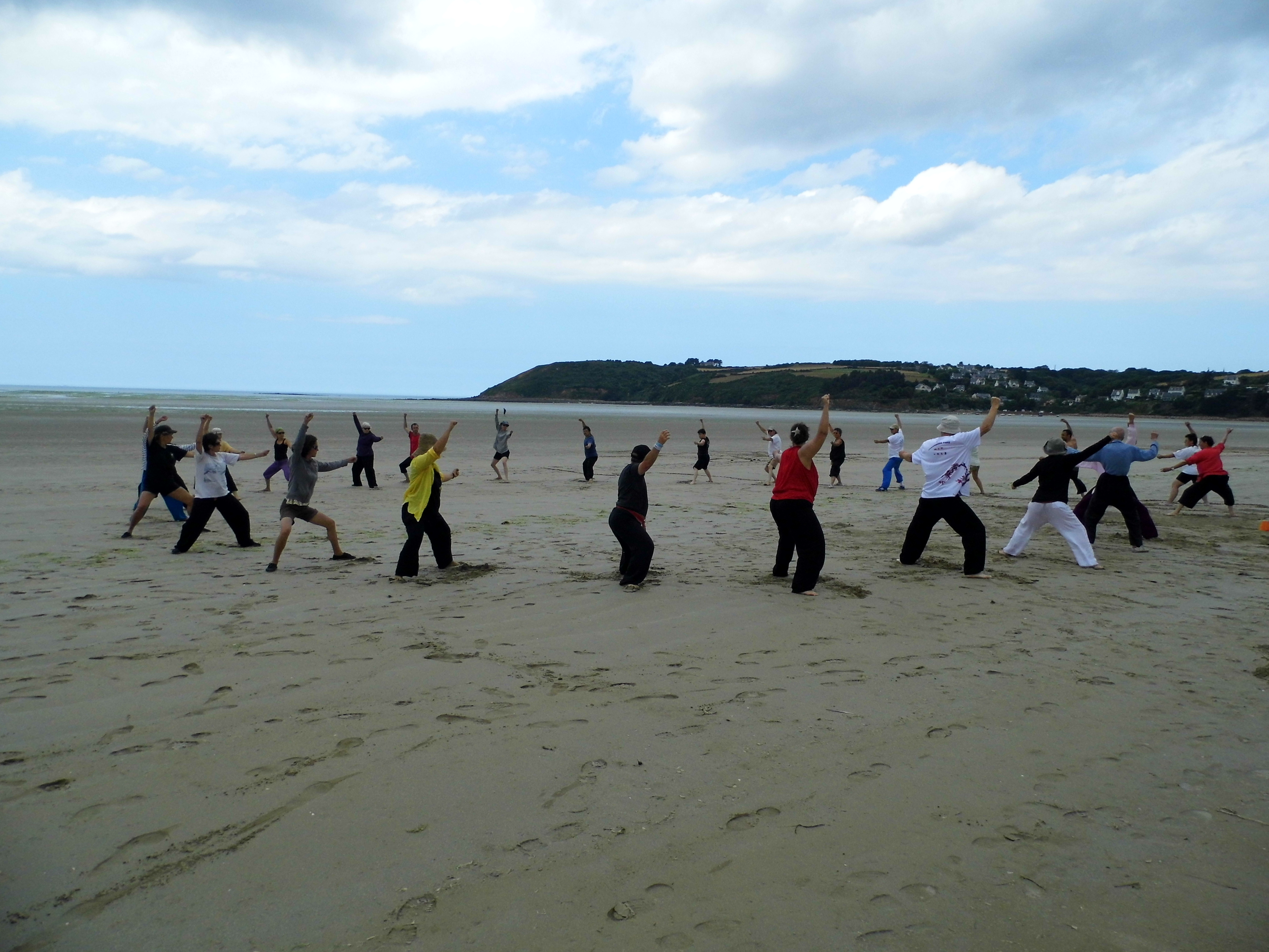 pratica "en cercle" del Meihuazhuang durante lo stage d'ete in Bretagna con L'associazione europea di MHZ